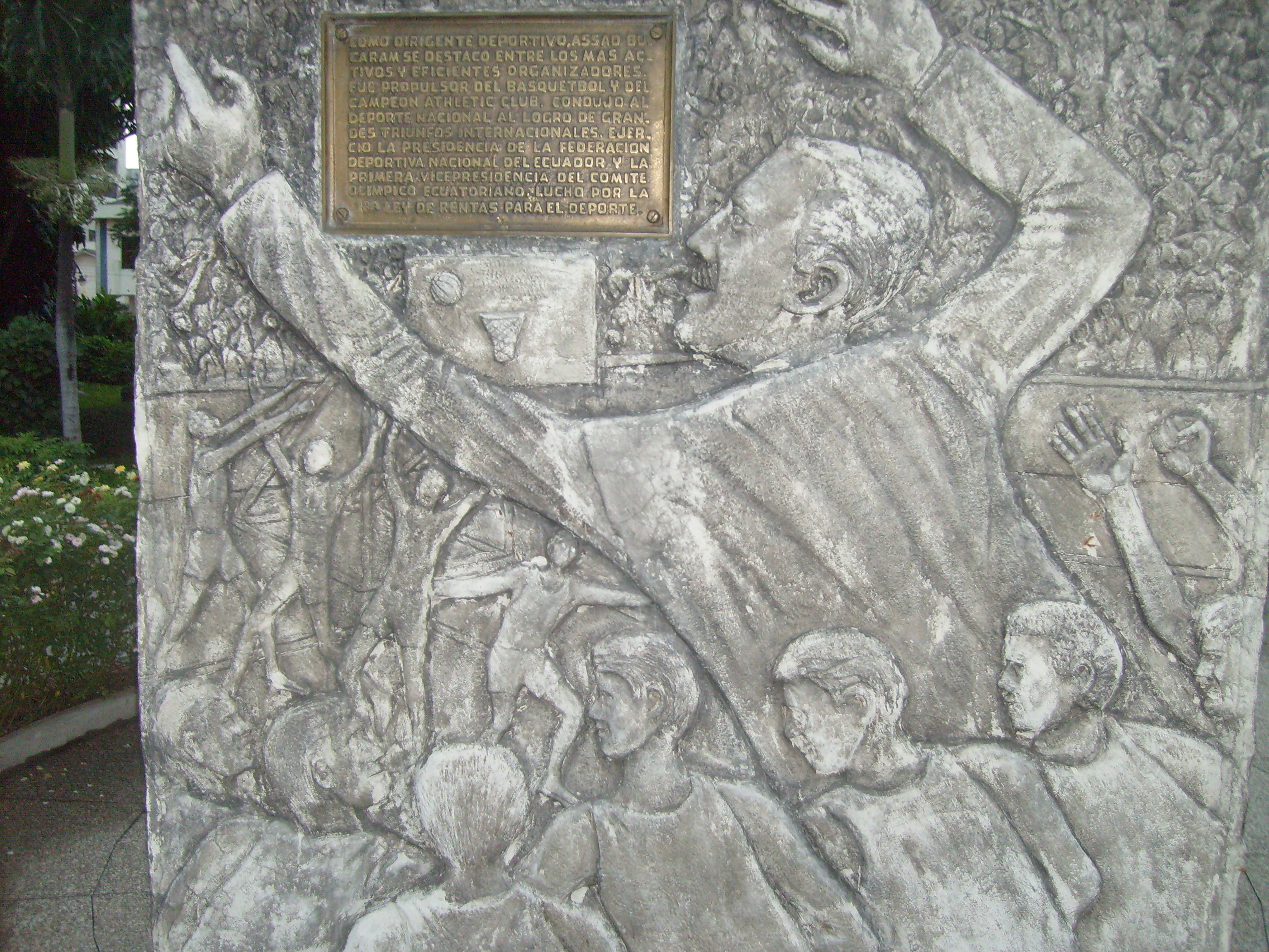 Base lateral derecha del monumento en memoria de Assad Bucaram, ubicado en el parque del Malecón del Salado de Guayaquil.